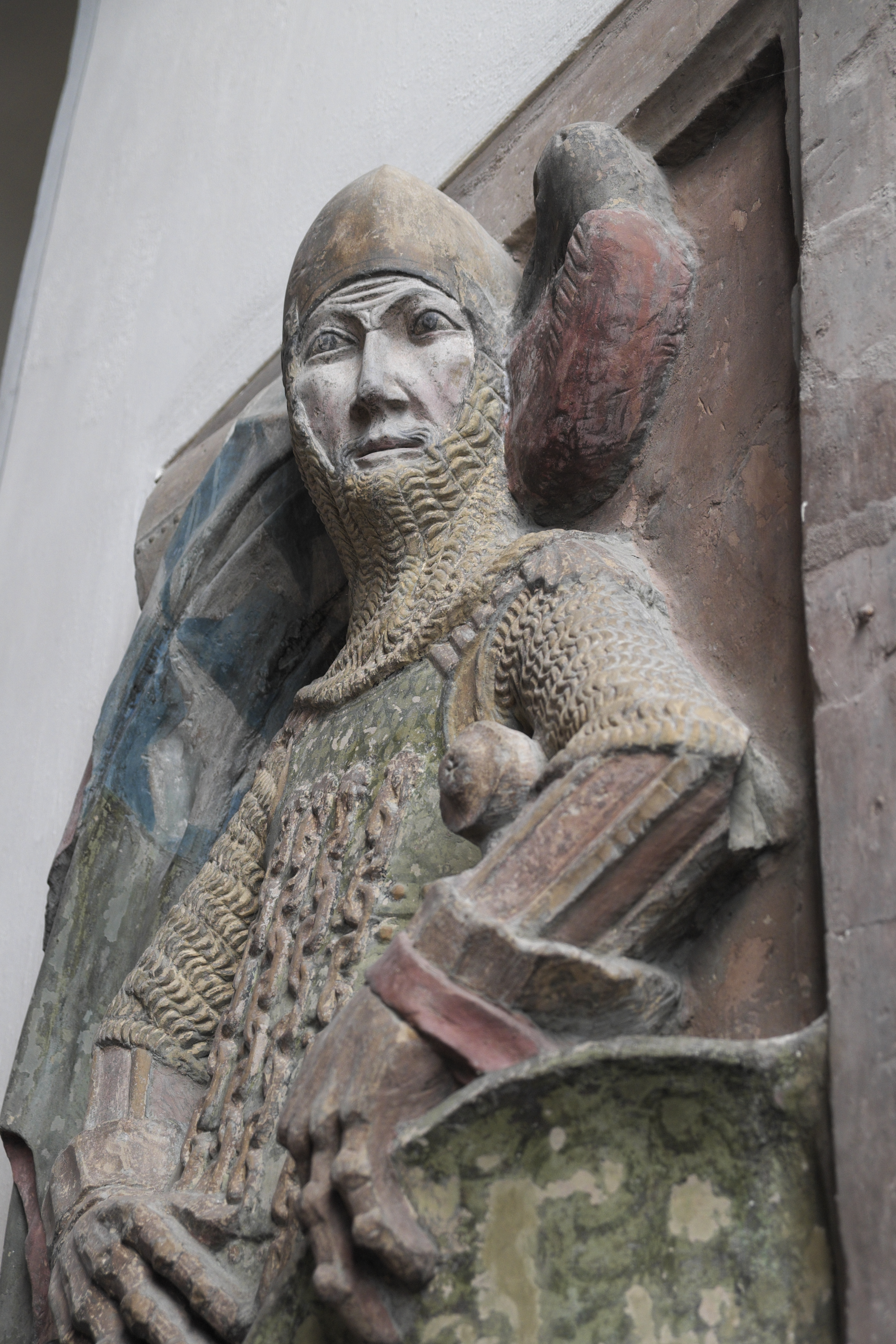 Evangelische Stadtkirche St. Blasius in Bopfingen, einer Stadt im Ostalbkreis (Baden-Württemberg), Grabmal des Ritters Walter von Bopfingen, von 1336